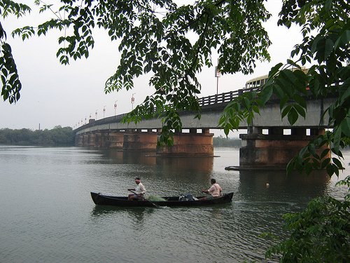 Valapattanam, India.